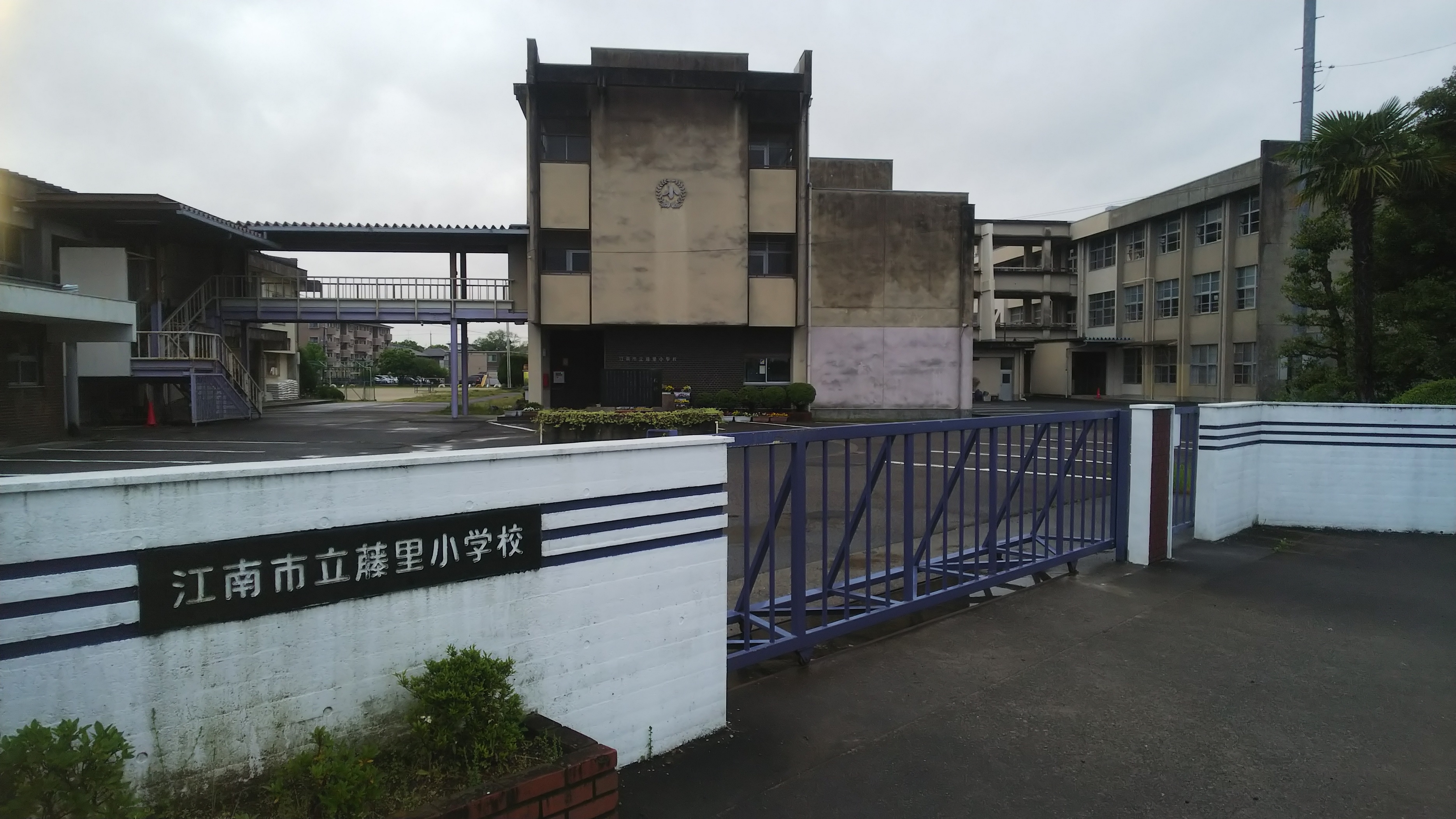 江南市立藤里小学校